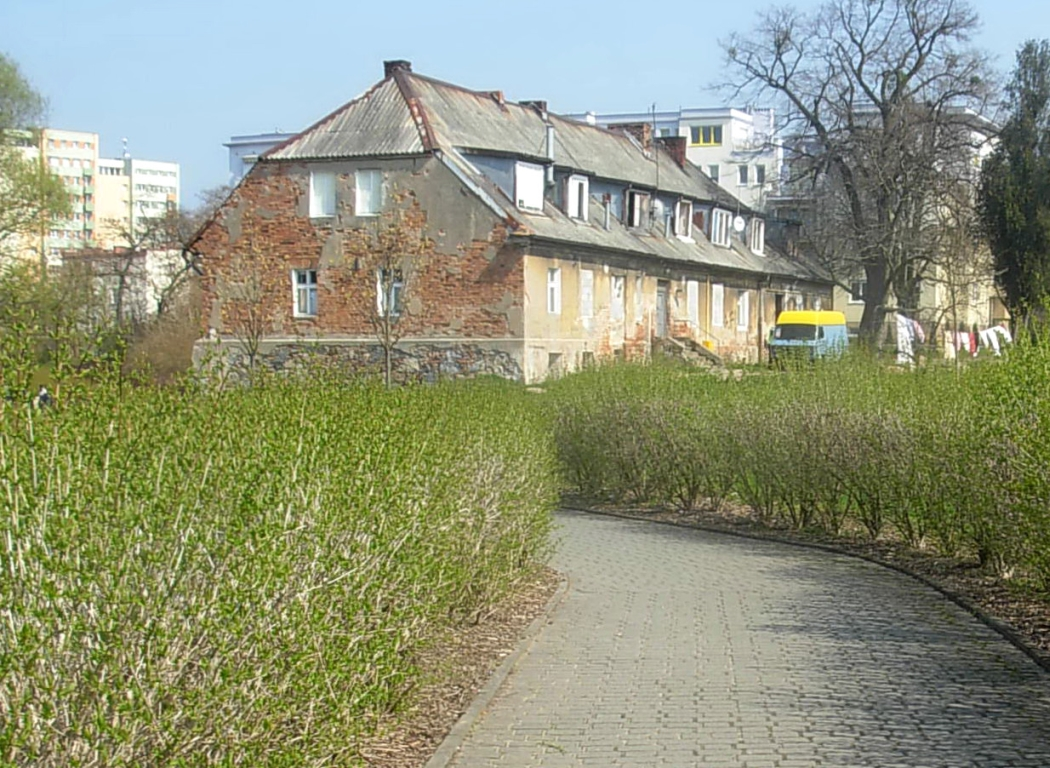 Park Dolina Pięciu Stawów w Bydgoszczy; dwór dawnego folwarku Goryczkowo z XIX w.